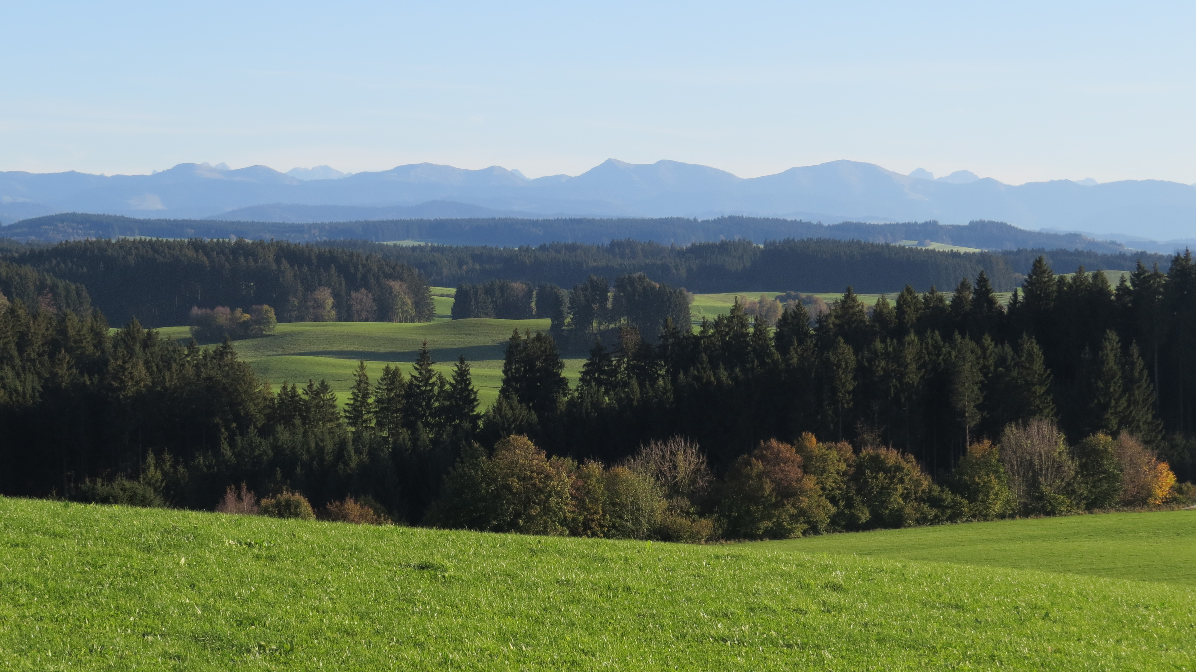 Blick vom Winterberg bei Tautenhofen zur Nagelfluhkette, Leutkirch im Allgäu